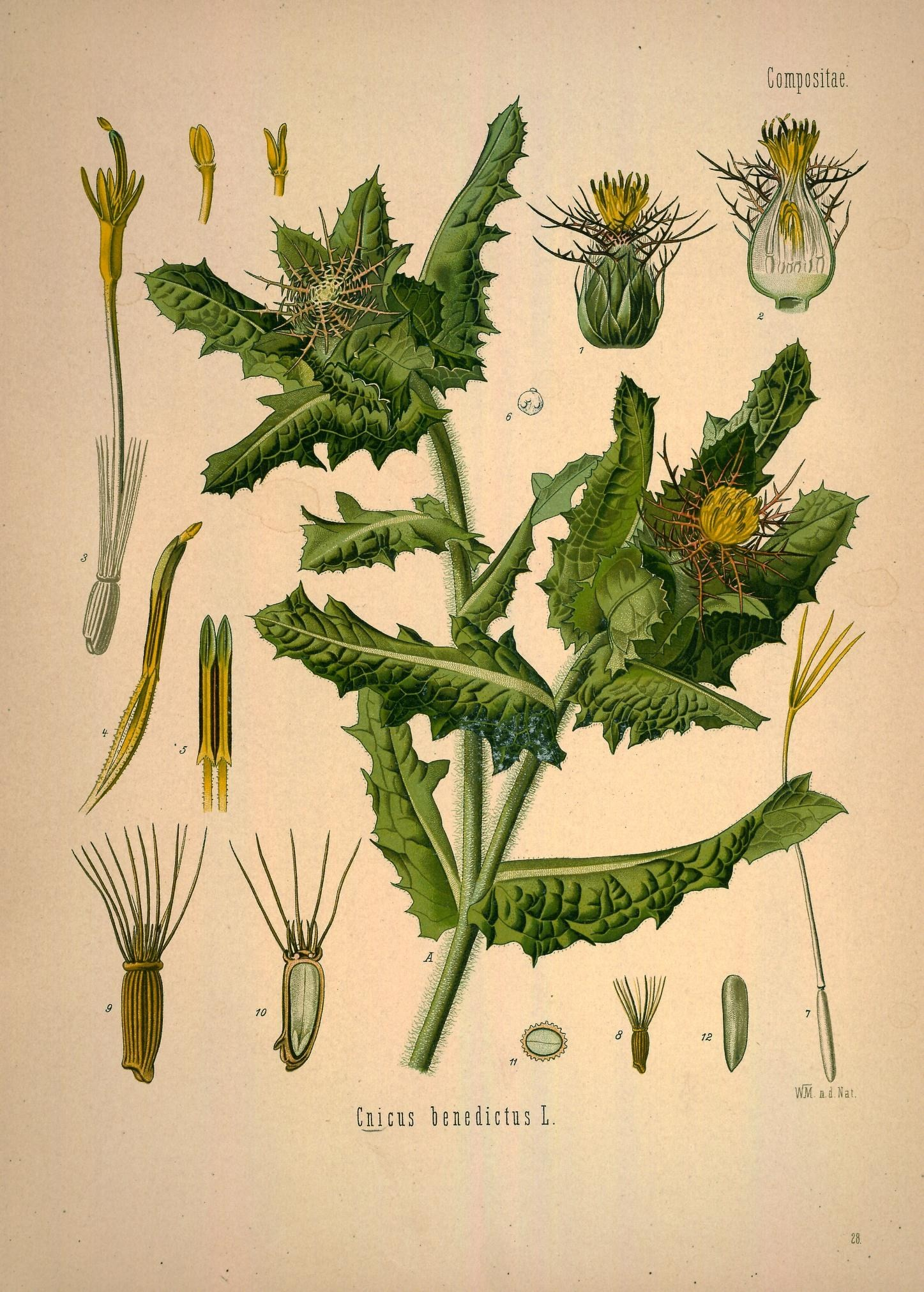 Benediktenkraut. A oberer Theil der Pflanze in natürl. Grösse; 1 Blüthenkopf von der Hülle befreit, desgl.; 2 derselbe im Längsschnitt, desgl.; 3 Scheibenblüthe, vergrössert; 4 Staubgefäss mit Griffel, desgl.; 5 Staubgefässe, desgl.; 6 Pollenkorn unter Wasser, desgl.; 7 geschlechtslose Randblüthe; 8 Frucht mit Pappus, natürl. Grösse; 9 dieselbe, vergrössert; 10 dieselbe im Längsschnitt, desgl.; 11 dieselbe im Querschnitt, desgl.; 12 Same, desgl.